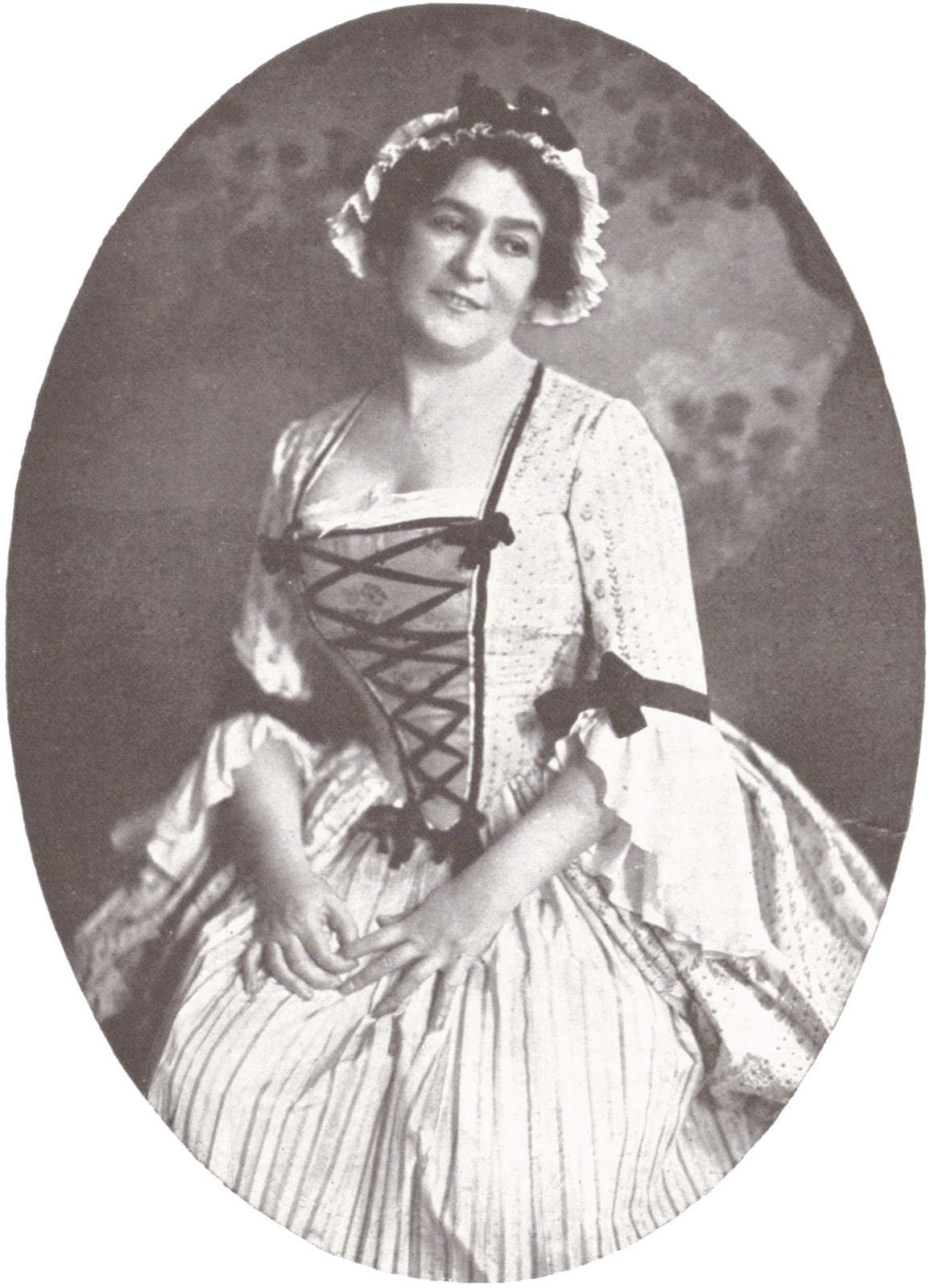 Selma Kurz (1874–1933), Austrian vocalist